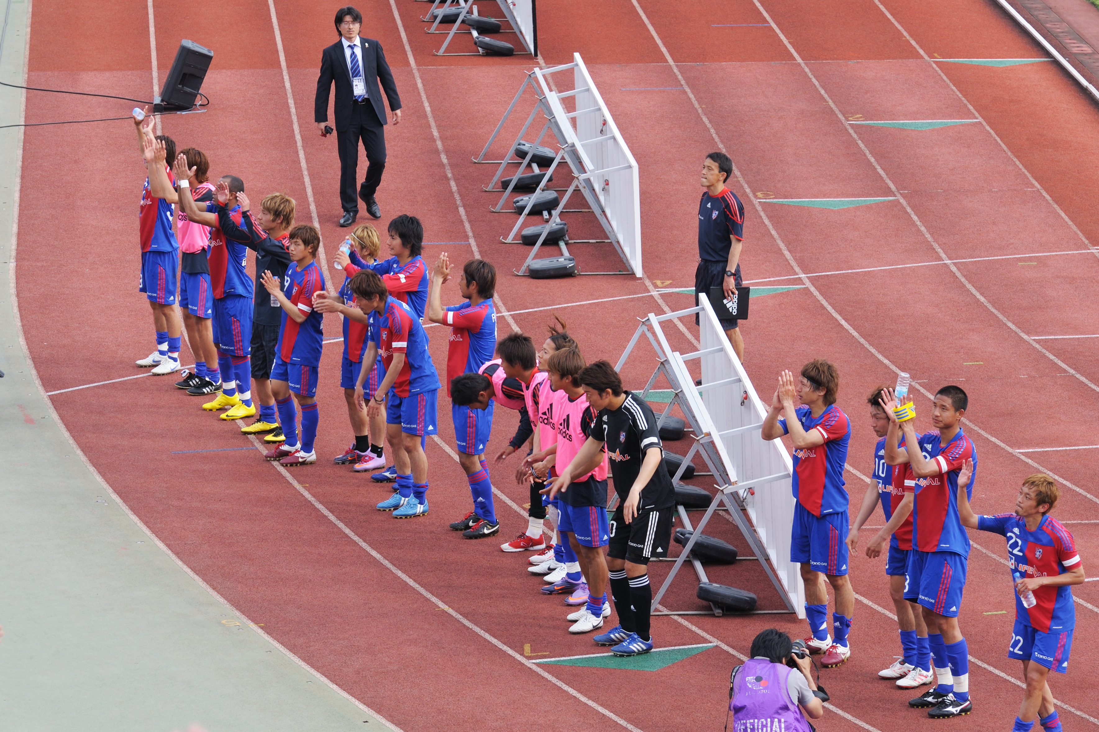 FC Tokyo squad DSC_4436